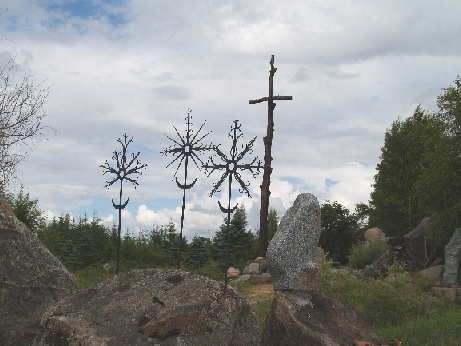 Saulutės. Orvidų sodyba